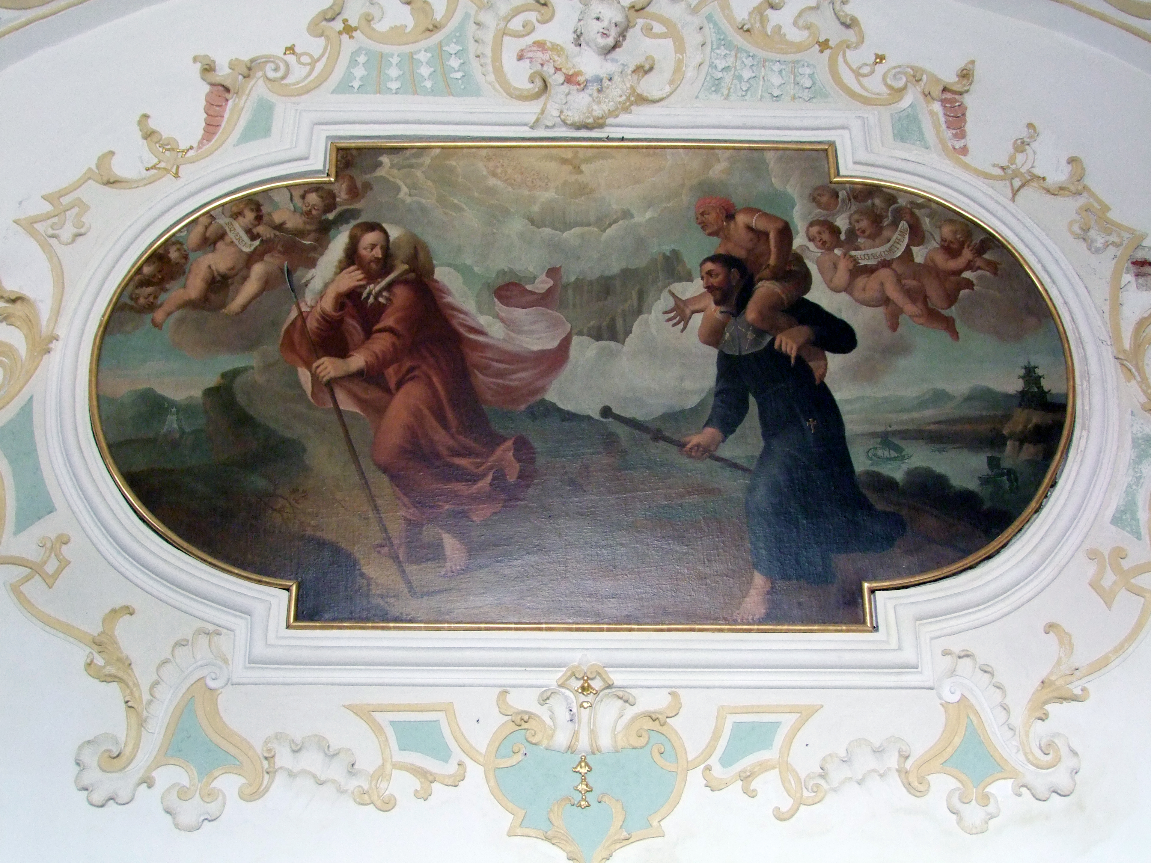 Mariä Verkündigung im oberschwäbischen Mindelheim. Ehemalige Augustiner, dann Jesuitenklosterkirche.